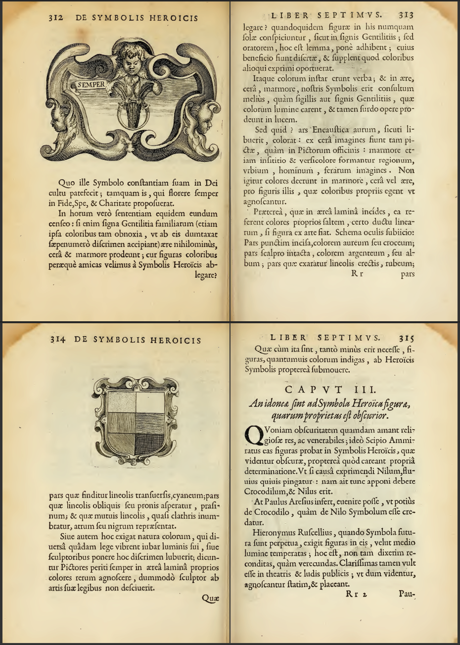 A vonalkázásos színjelölés leírása The the description of hatching system